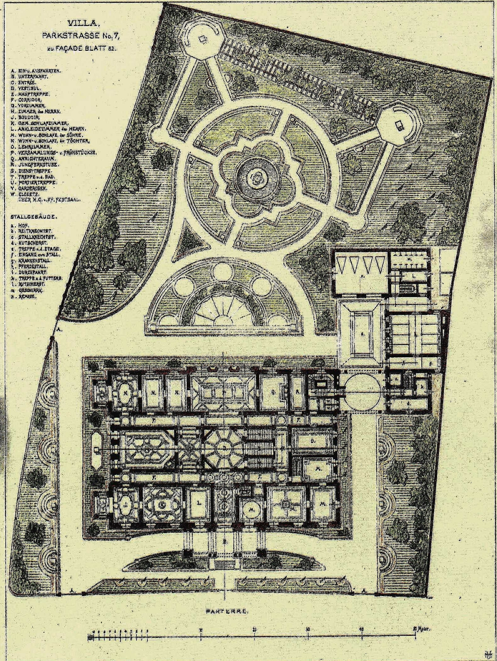 Grundriss Palais Kap-herr